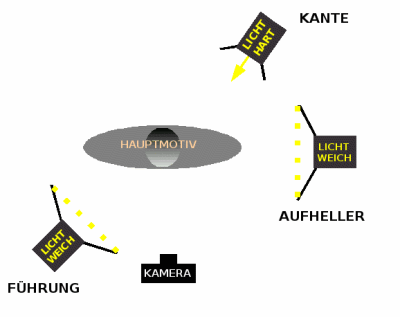 Lichtführung mit drei künstlichen Lichtquellen (Führungslicht weich, Aufhellicht weich, Kante hart).